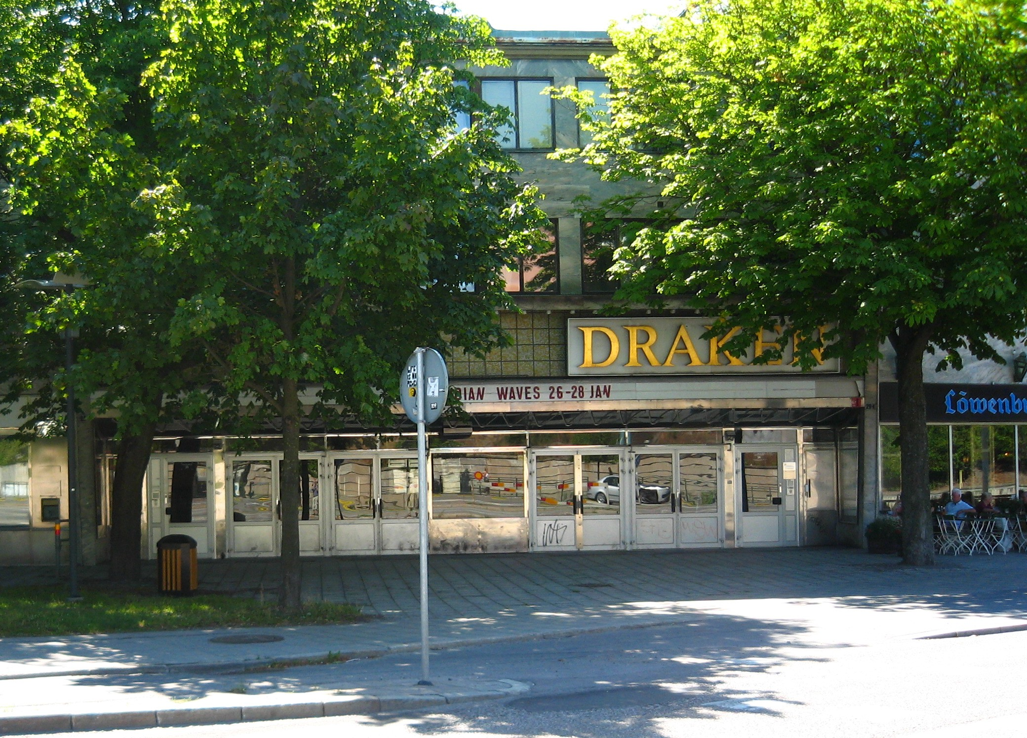 Föredetta Biograf Draken